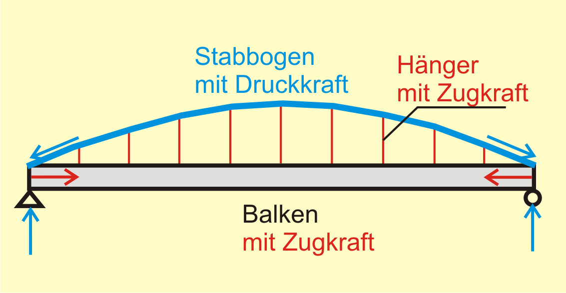 Systemskizze Langerscher Balken, Schnittgrössen beim Lastfall Eigengewicht (Belastung Eigengewicht nicht dargestellt)